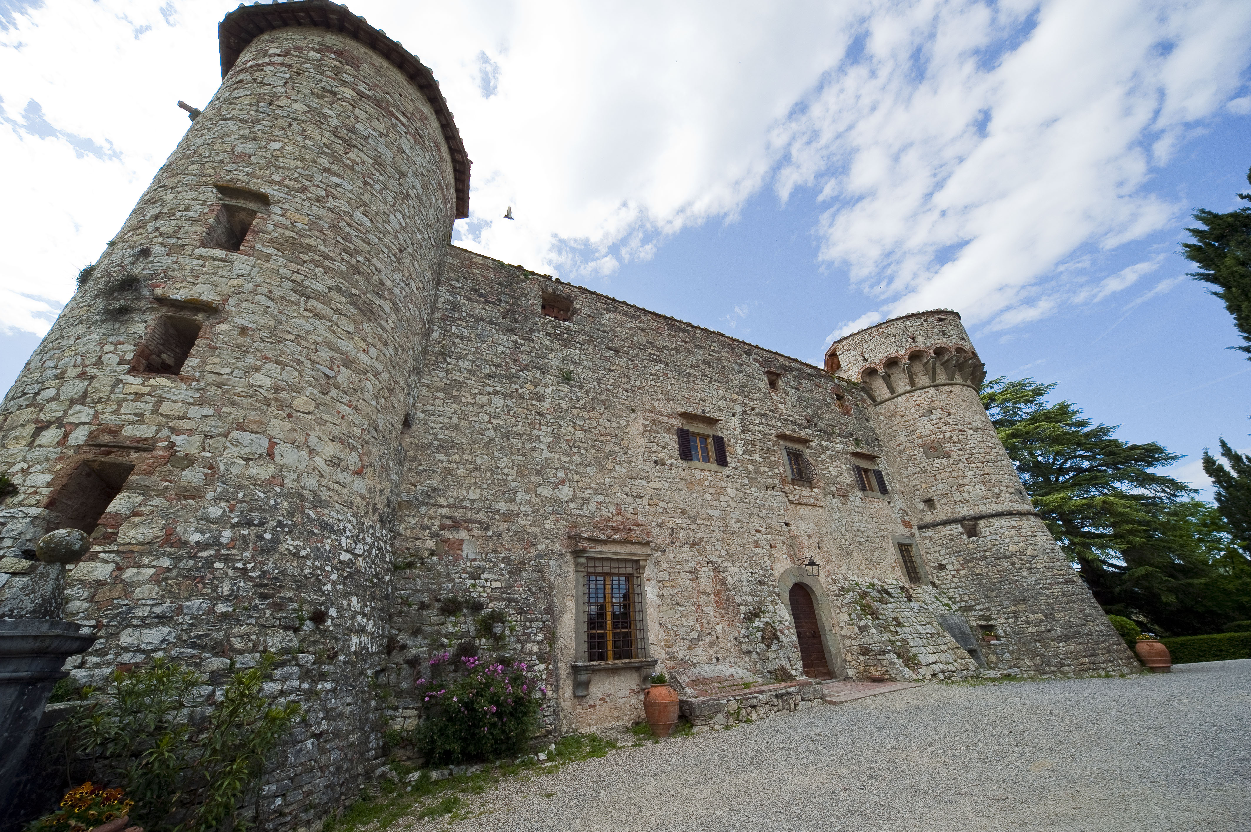 Castello di Meleto, facciata - Gaiole in Chianti